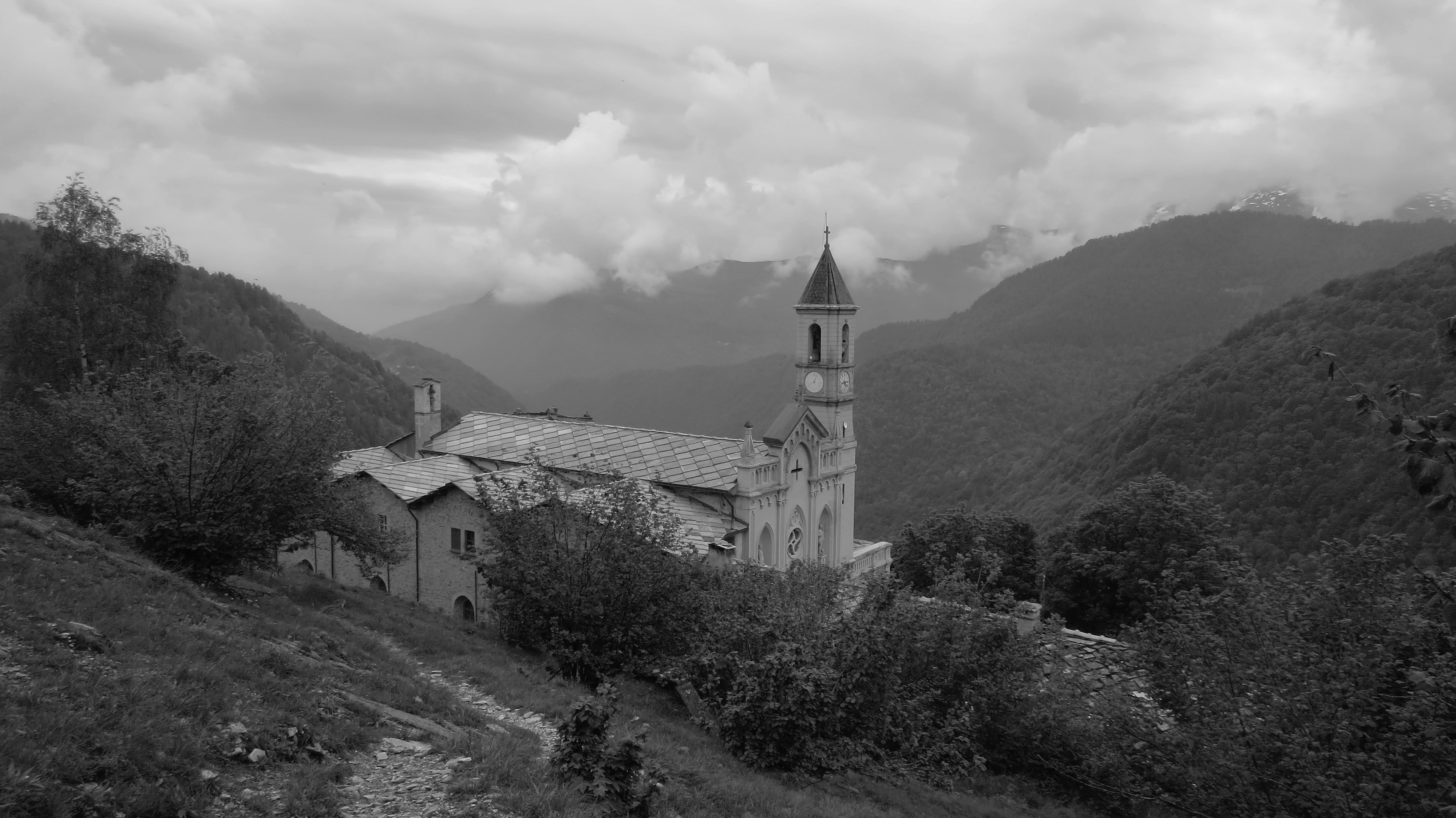 Parco del Monviso (Q47192508)